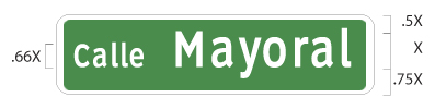 Ejemplo de una placa de calle escrita con el tipo Clearview con indicaciones sobre las proporciones y la situación del texto.